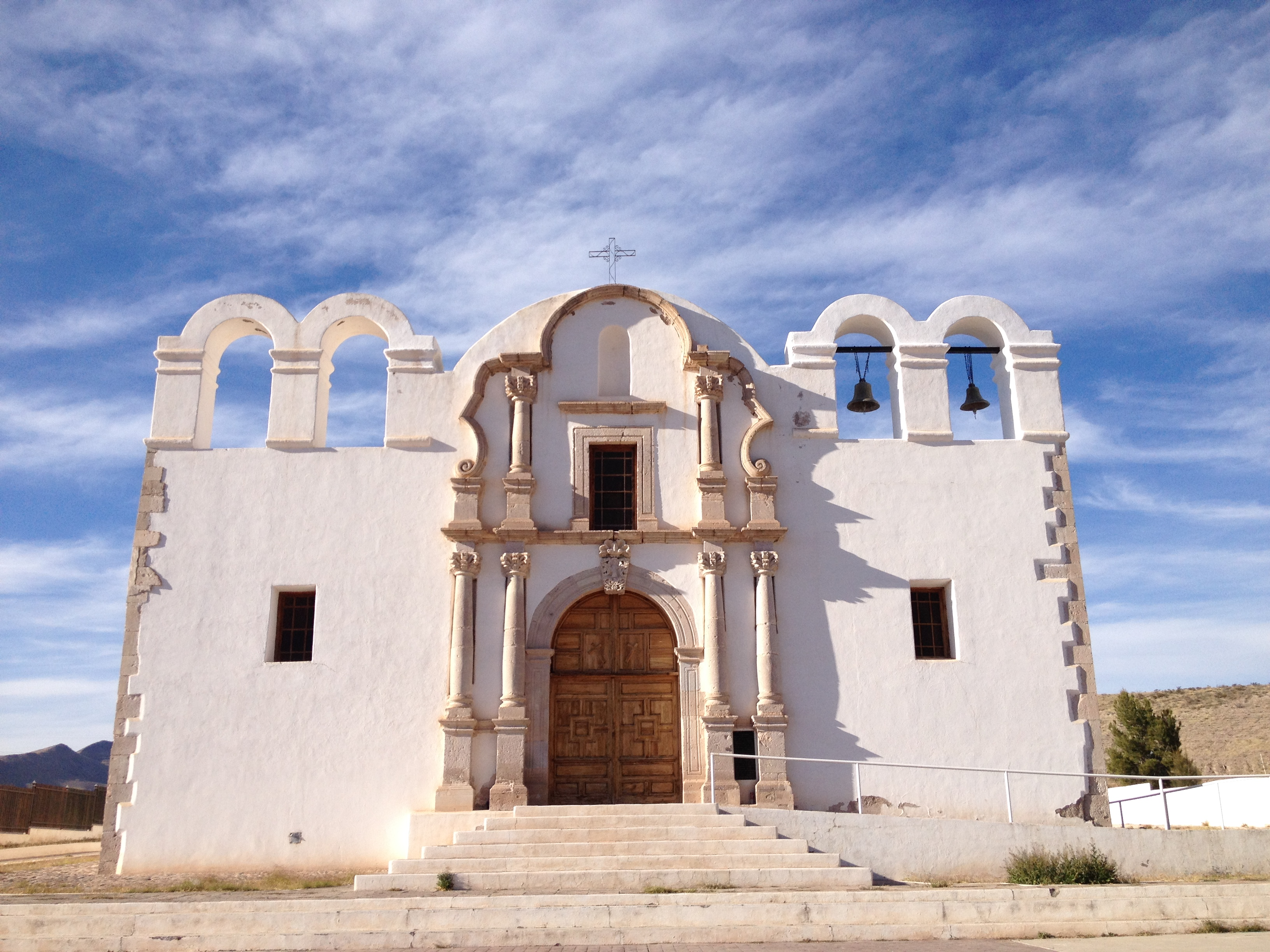 Fachada del templo de la antigua misión de Santa Ana de Chinarras en las cercanías de Aldama, Chihuahua